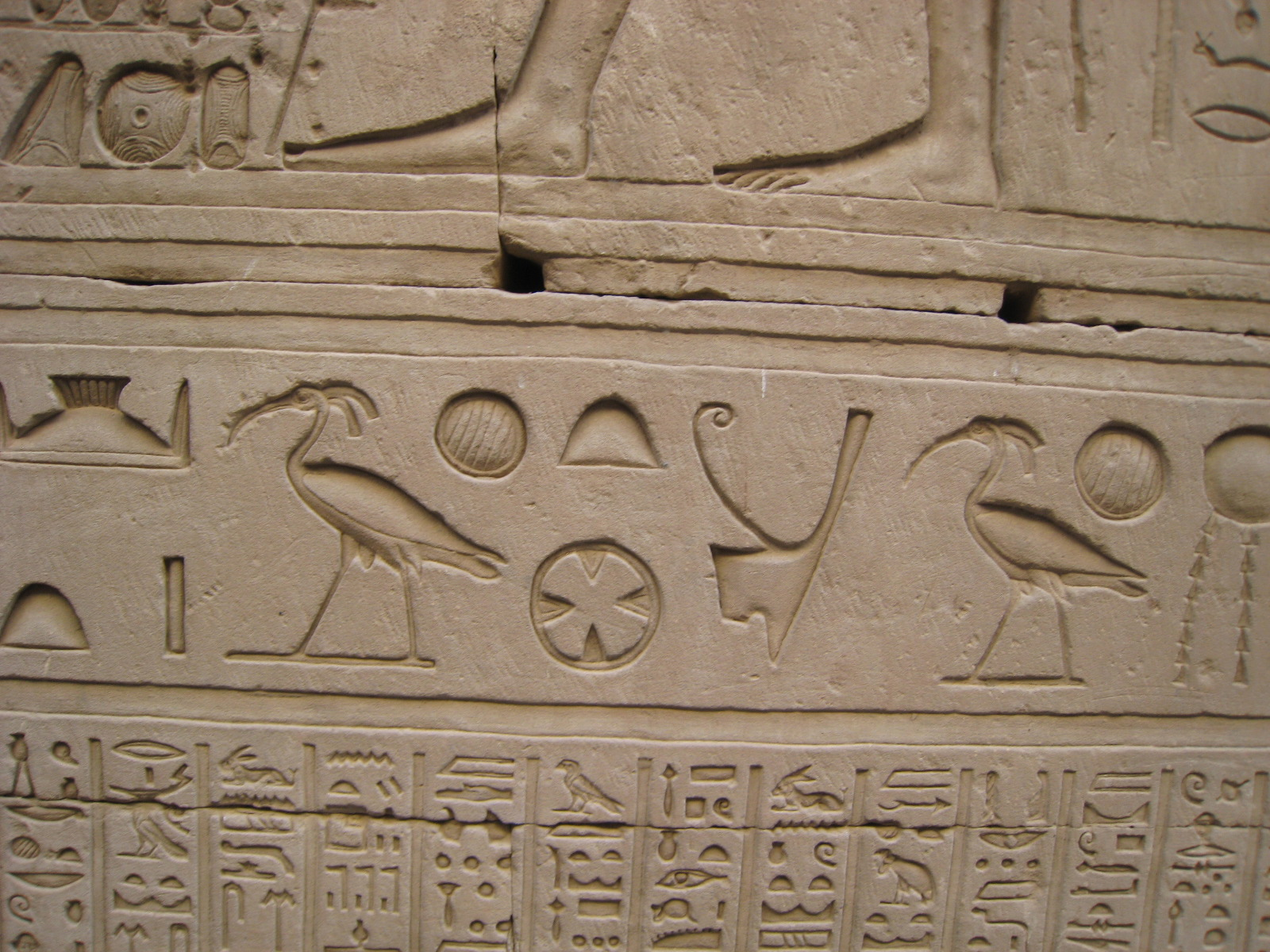 nice ibises